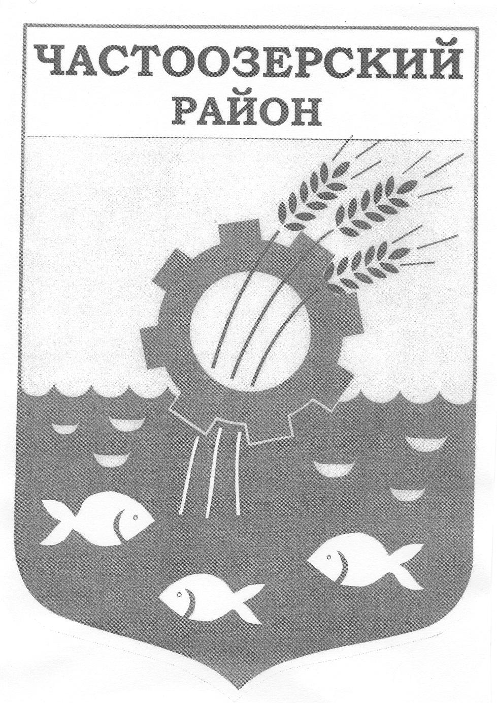 Герб Частоозерского района